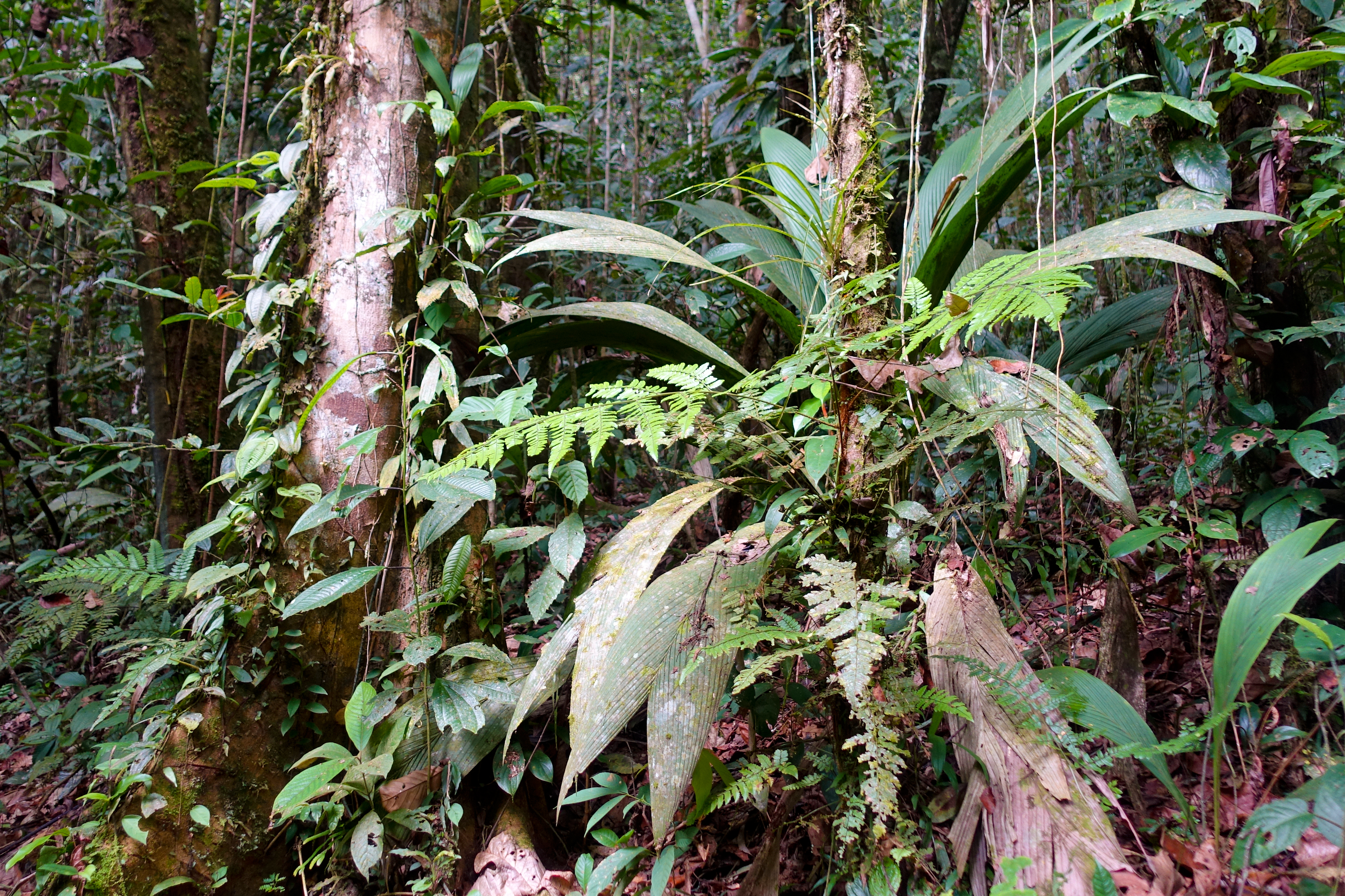 Artenvielfalt auf engstem Raum in der Terra firme des Cuyabeno Wildtier-Reservates, Ecuador